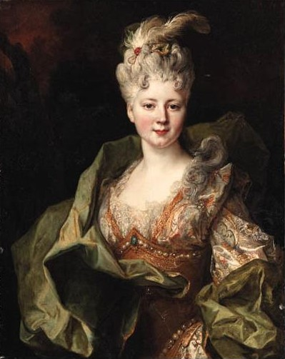 Portrait de Mlle Jeanne Gagne de Perrigny